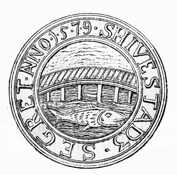 Skive' købstadssegl